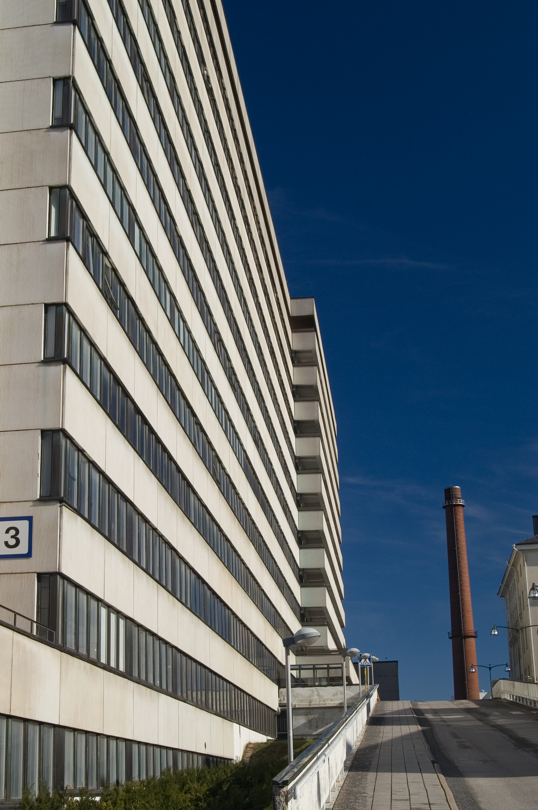 TYKS U-sairaala. Arkkitehdit Martta ja Ragnar Ypyä, 1955–1968.